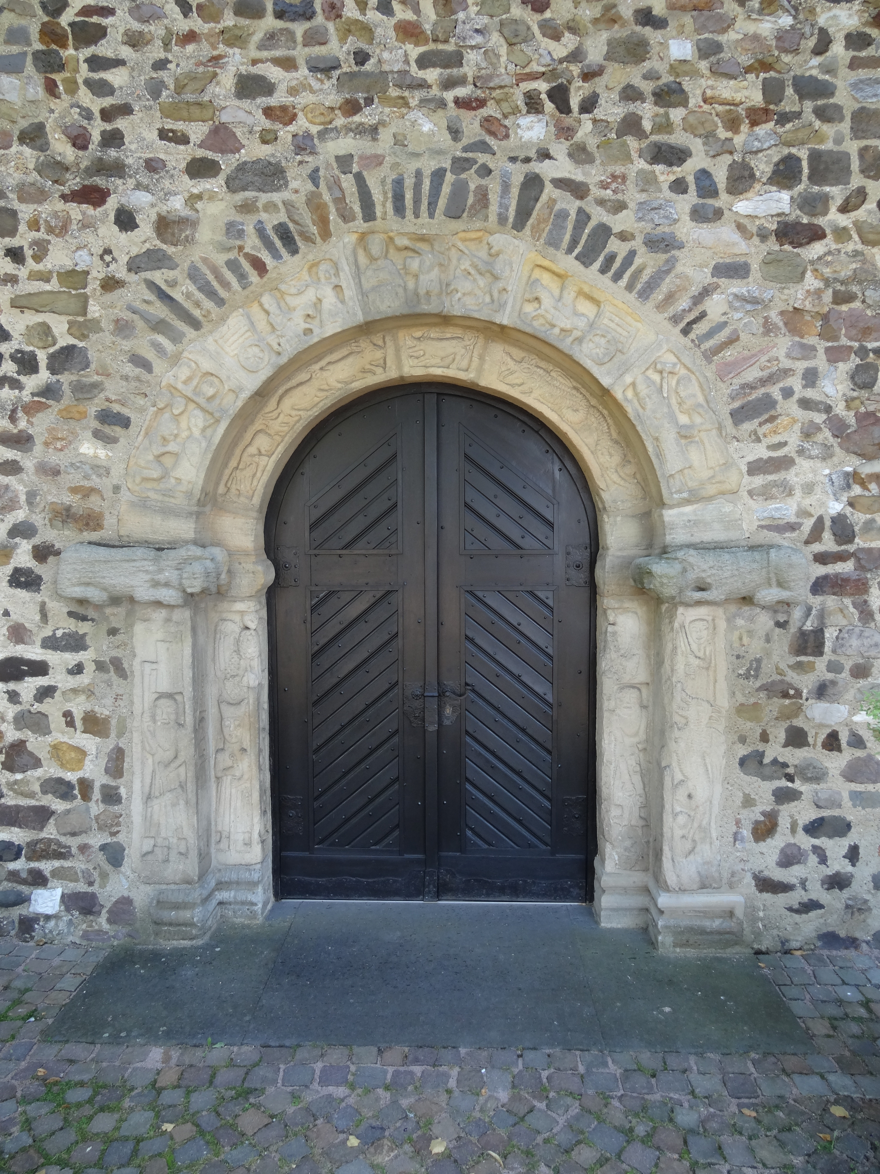 St. Peter (Großen-Linden)